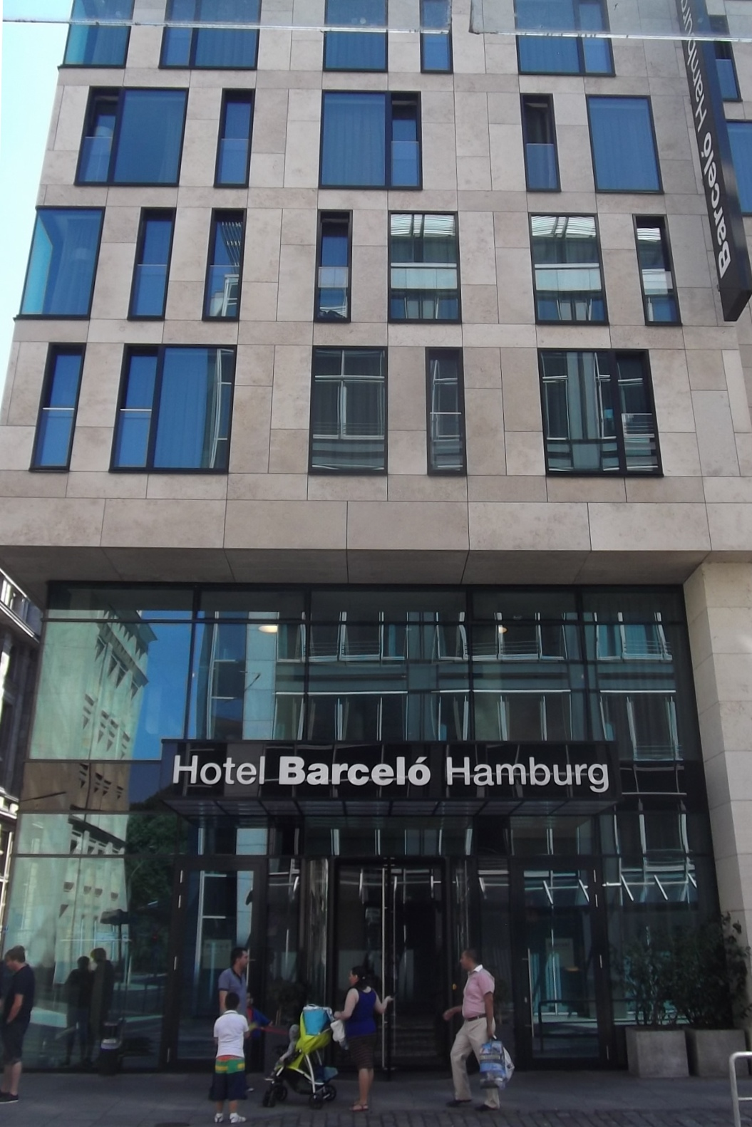 Barceló Hamburg, Hamburg, August 2015